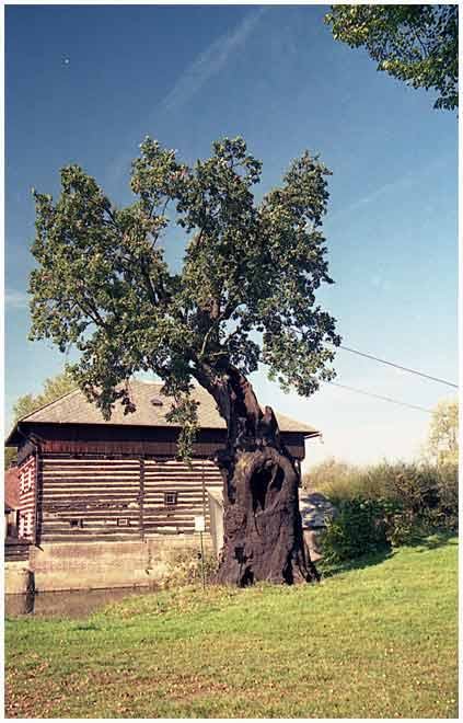 památný dub v Popovicích